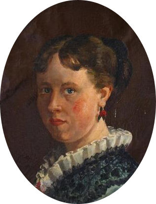 Zelfportret van Clara Bruins uit de collectie van Museum De 5000 Morgen.